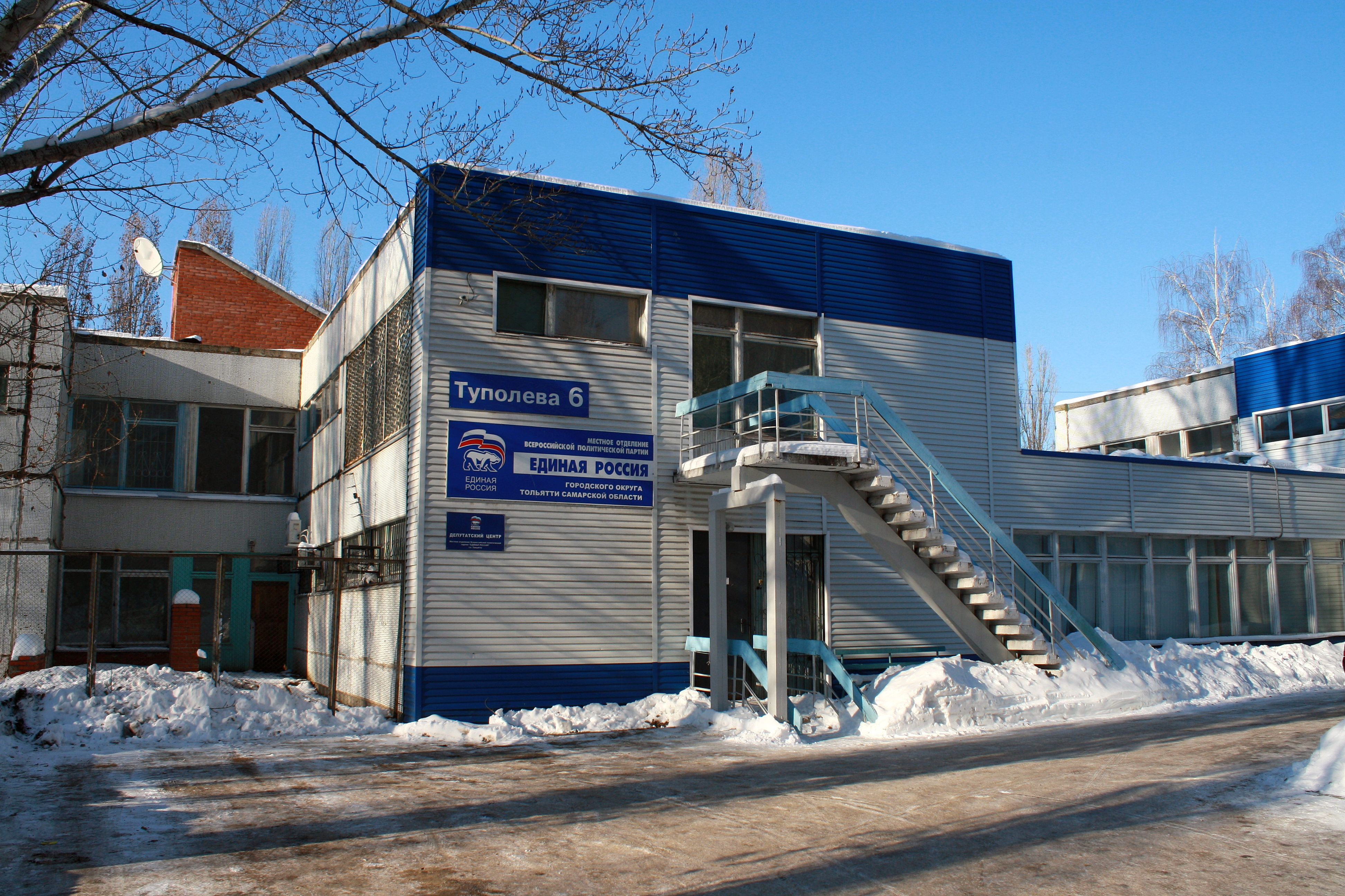 Центральный офис местного отделения политической партии "Единая Россия" в г.Тольятти